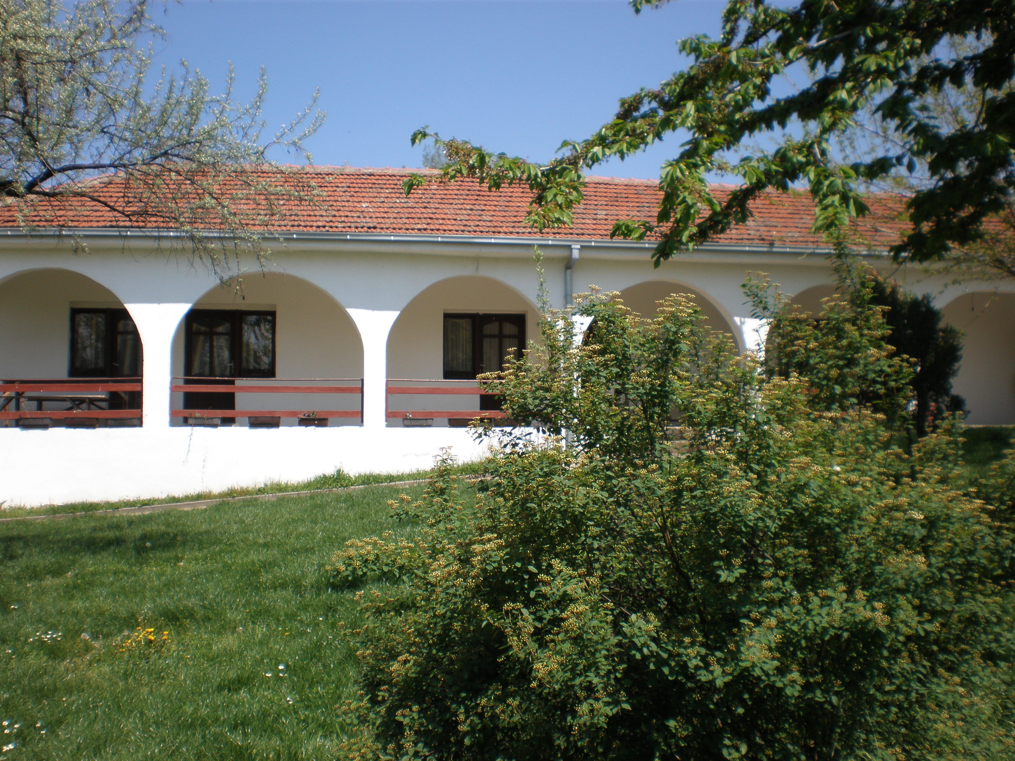 Конакот со соби во манастирот Пеленица кај Драчево